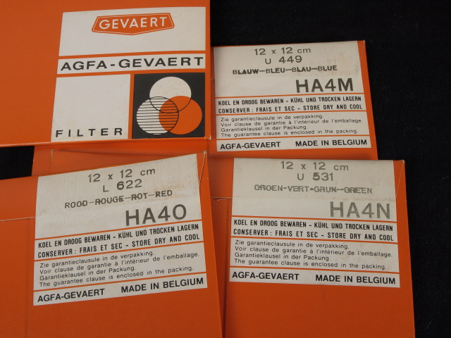 Agfa-Gevaert Gelatinefarbfilter, „Schmalband"-Farbauszugsfilter, L 622 (rot) U 531 (grün) U 449 (blau), Format 9x12 cm